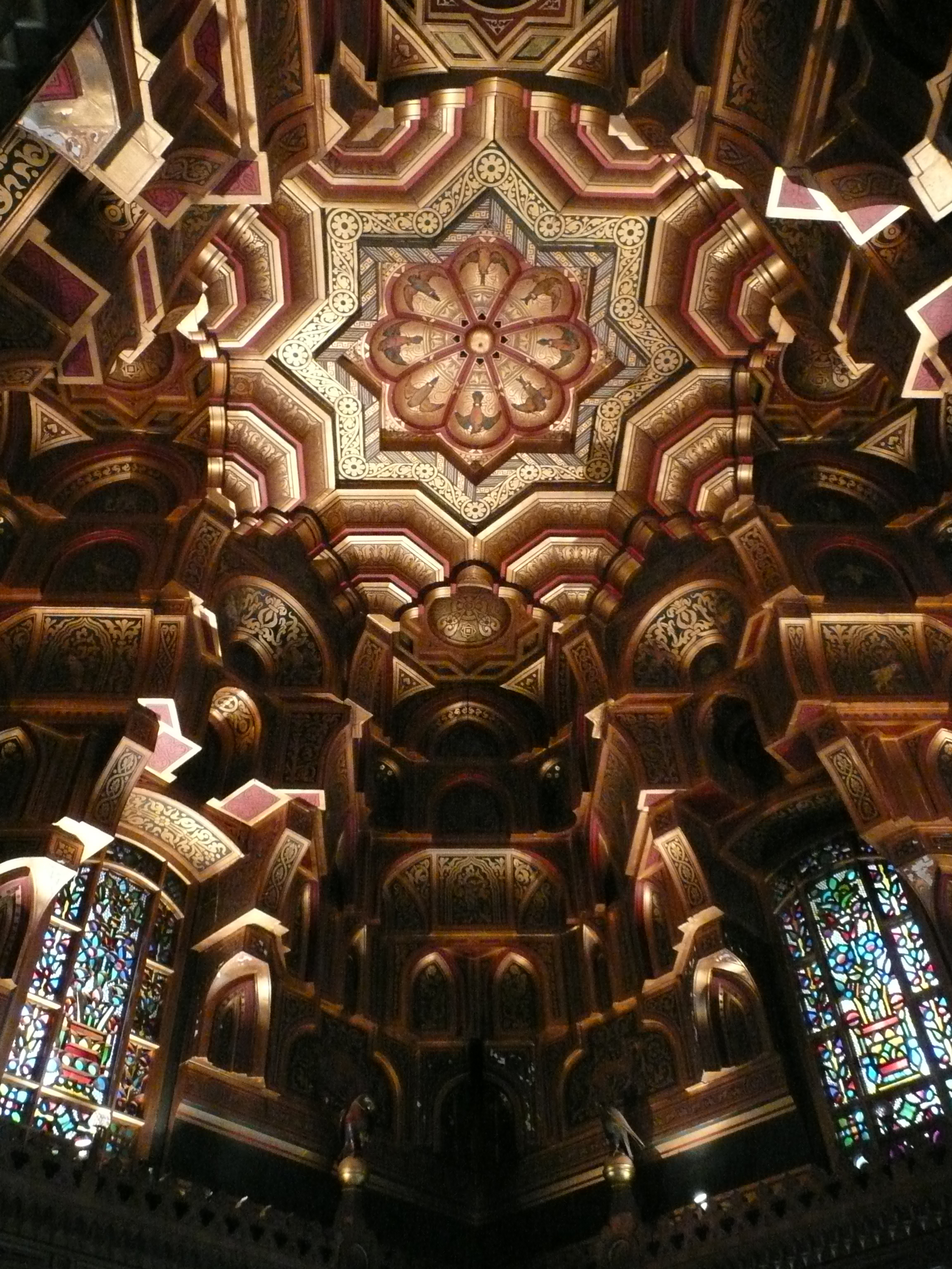 cardiff, wales